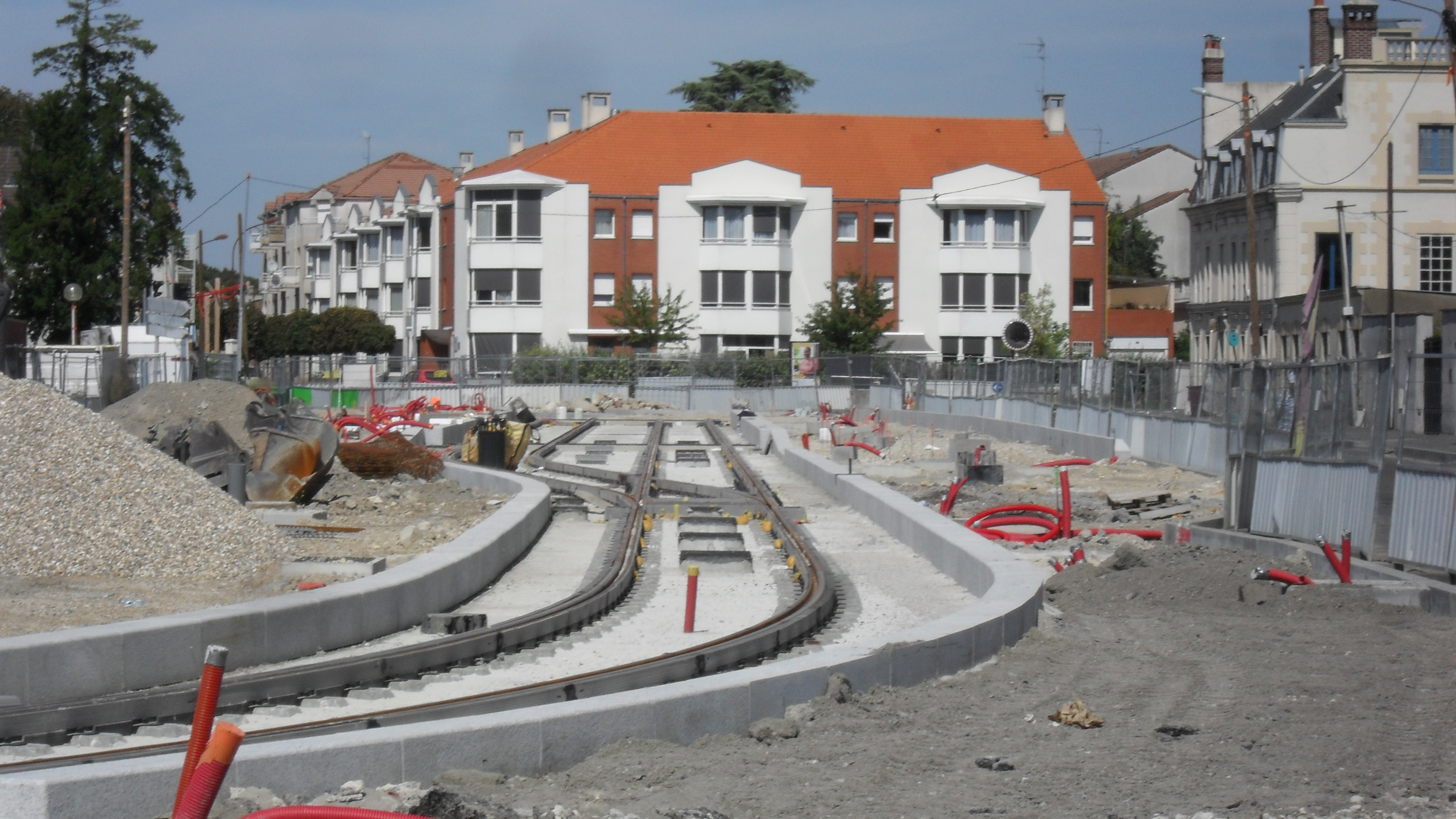 Le futur terminus Hôpital de Montfermeil vu de plus près